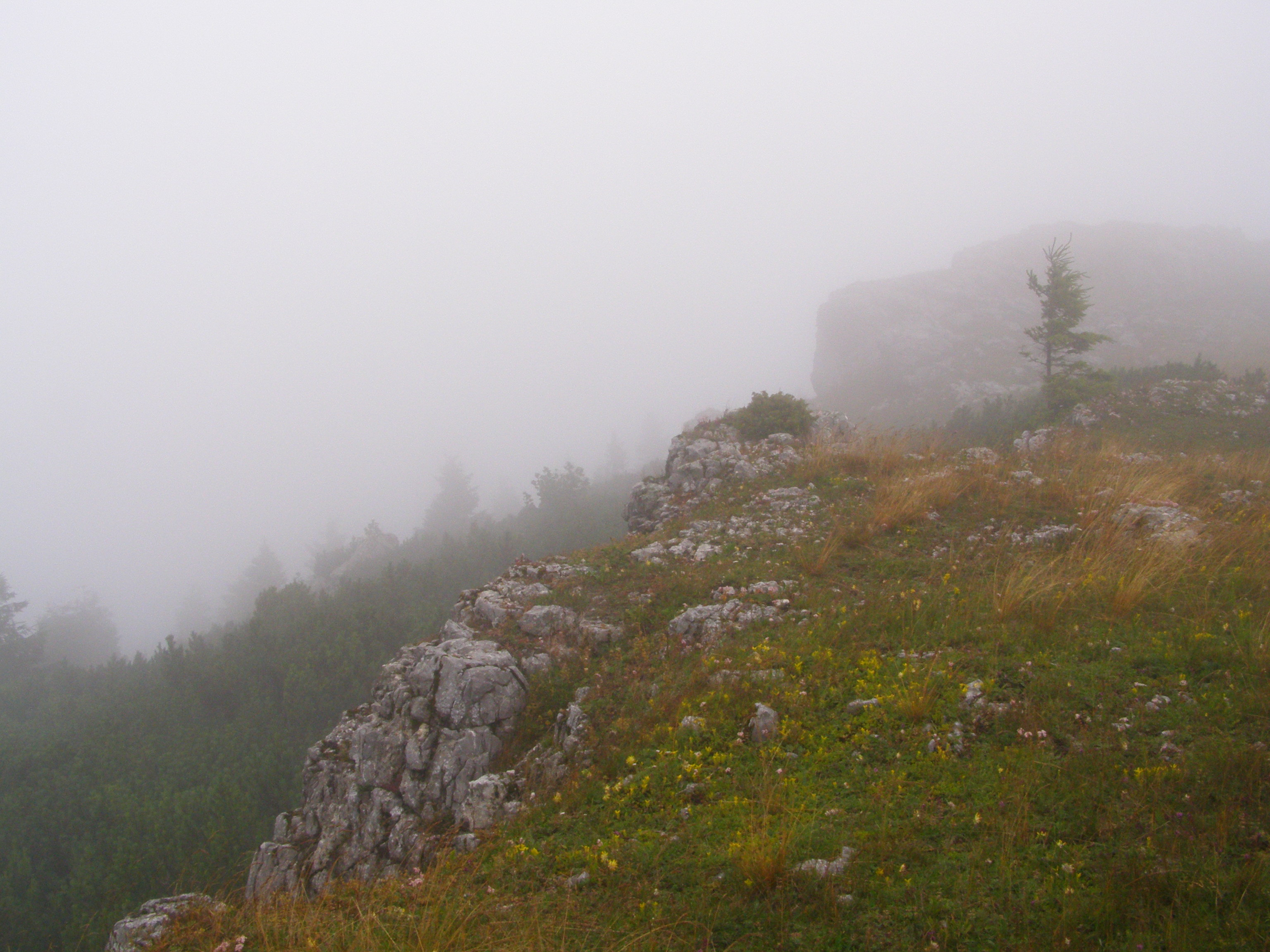 Lúčanská Fatra, vrchol Skalky (1191 m)